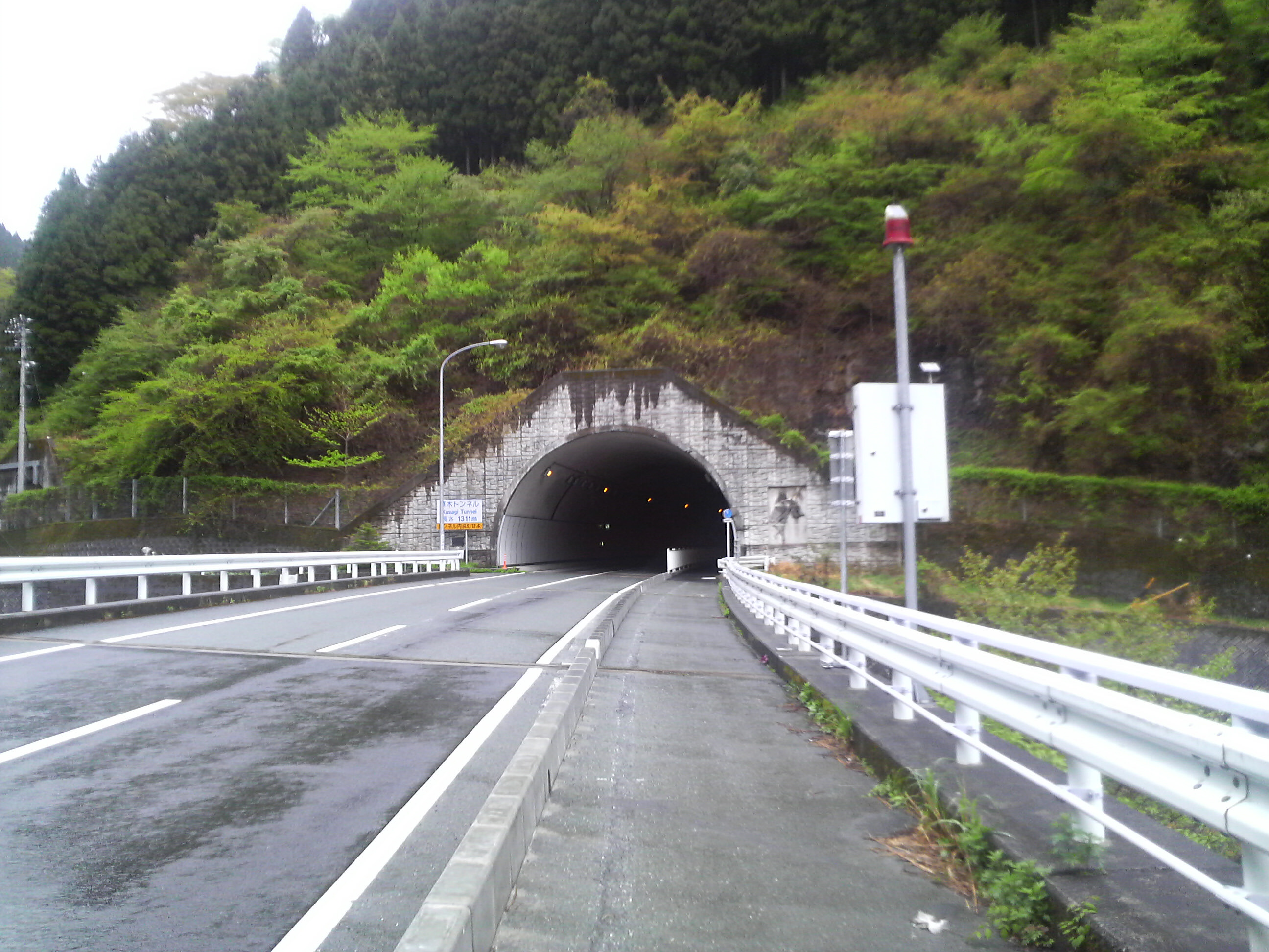 草木トンネル（西口）